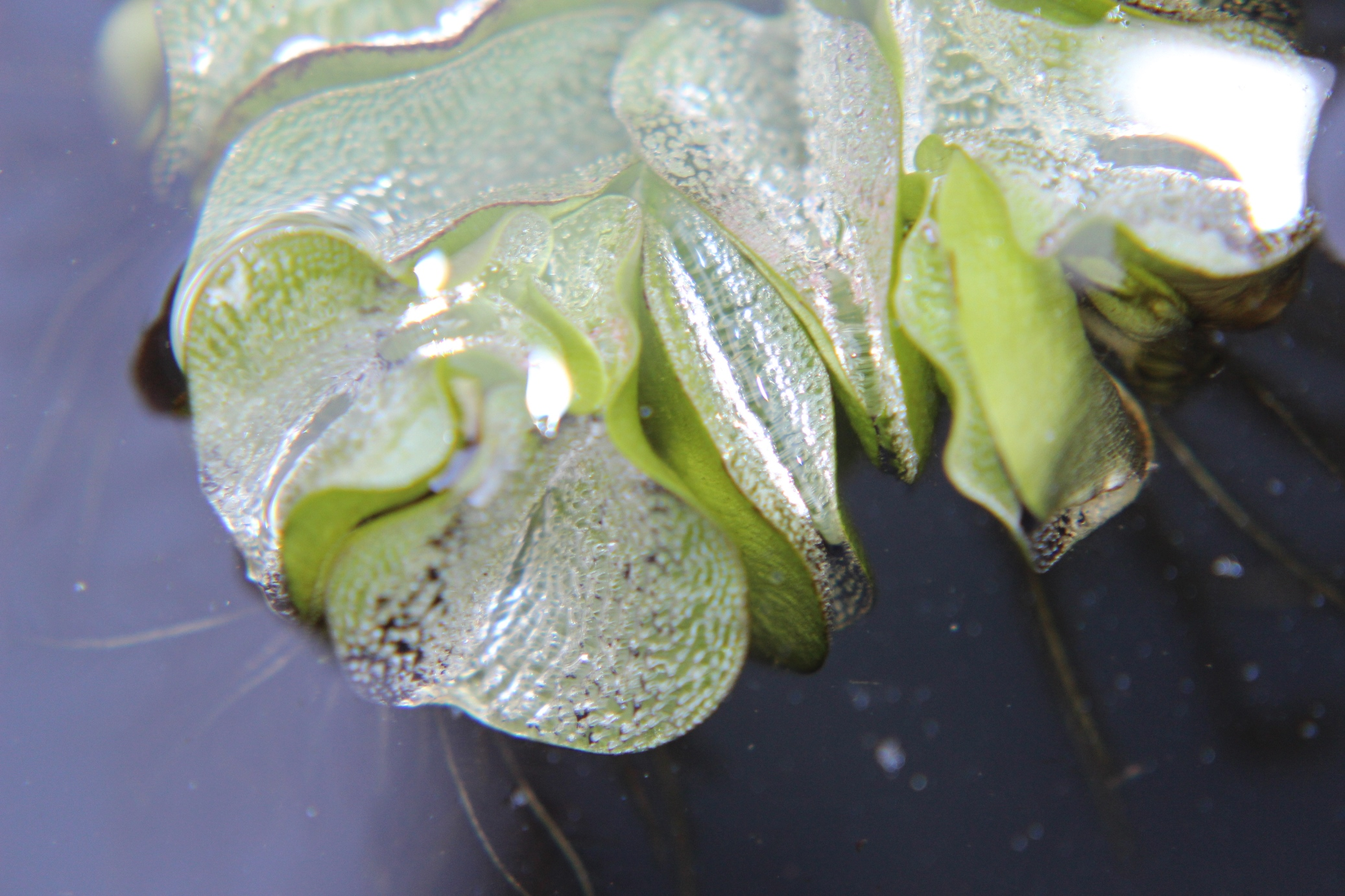 Das Bild zeigt unter Wasser getauchte Blätter von Salvinia molesta. Der silbrige Glanz ist auf die Lichtreflektion an der Grenzfläche zwischen der von den Blättern gehaltenen Luftschicht und dem umgebenden Wasser zurückzuführen.